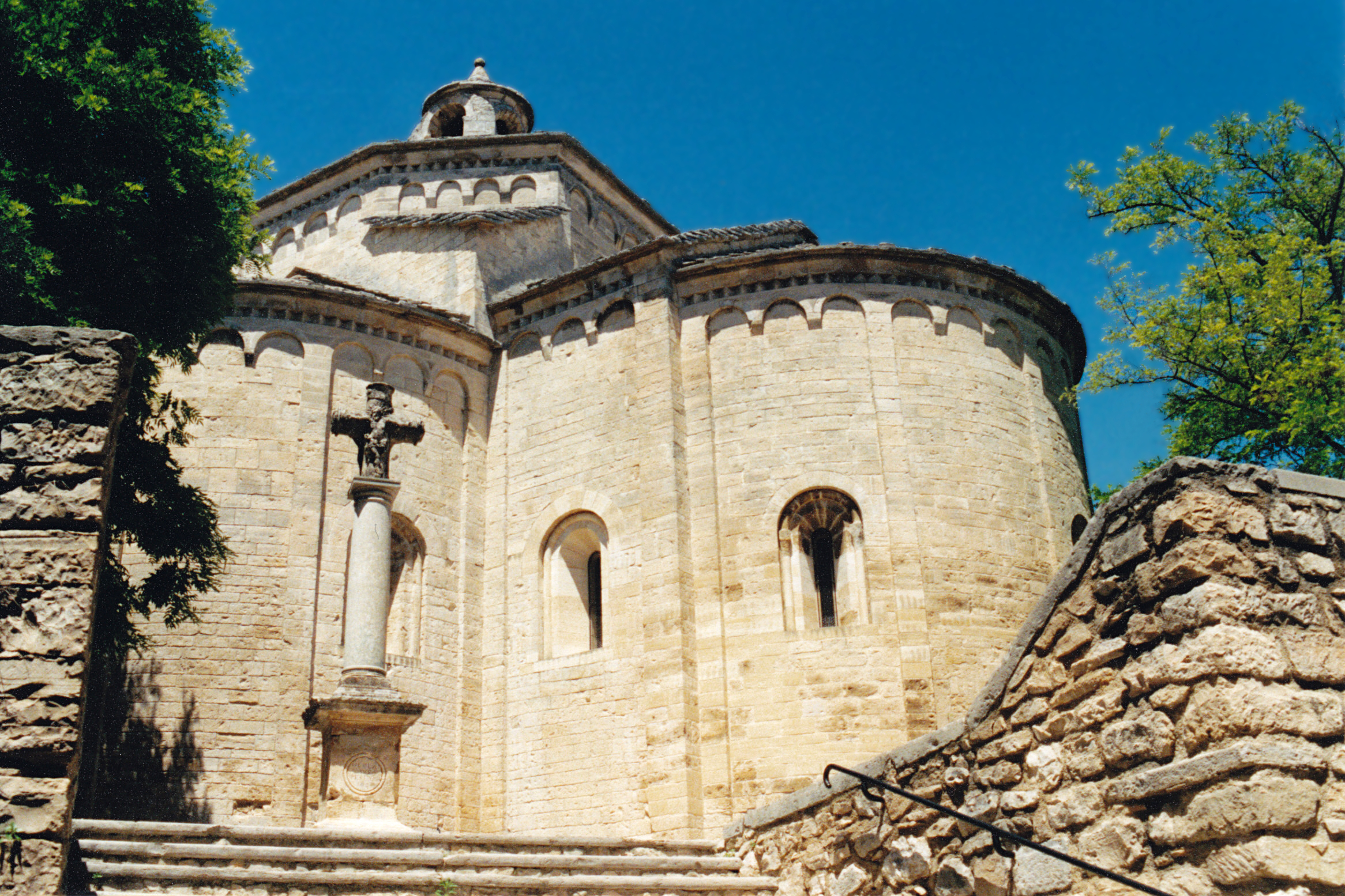 France - Languedoc - Hérault - Église de Saint-Martin-de-Londres